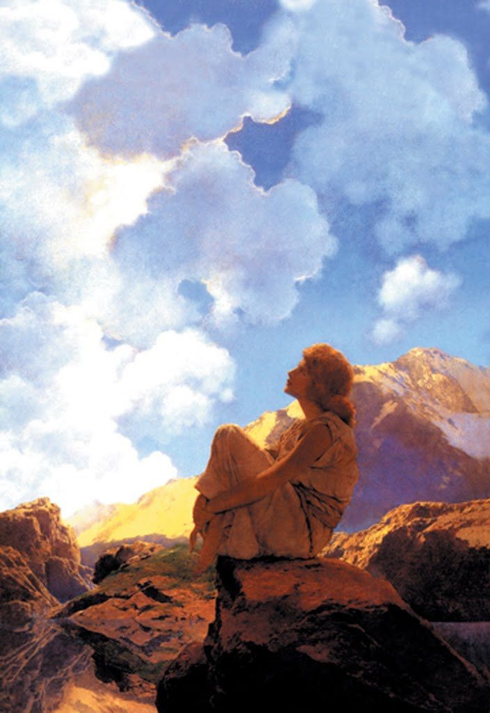 Maxfield Parrish (1870—1966). Morning, 1922